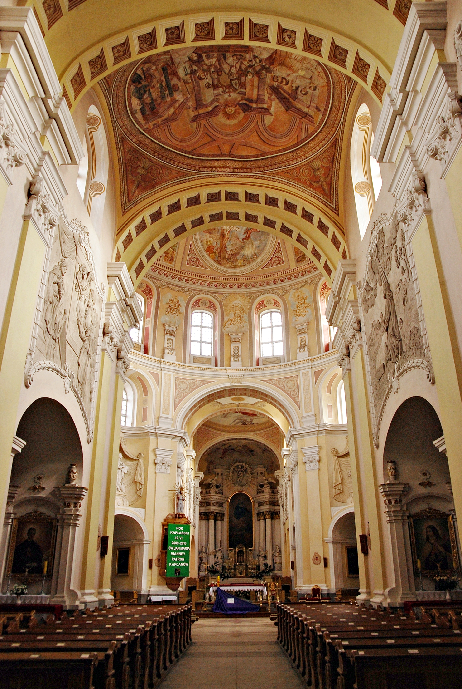 Wnętrze bazyliki w Trzemesznie (widok w stronę prezbiterium)